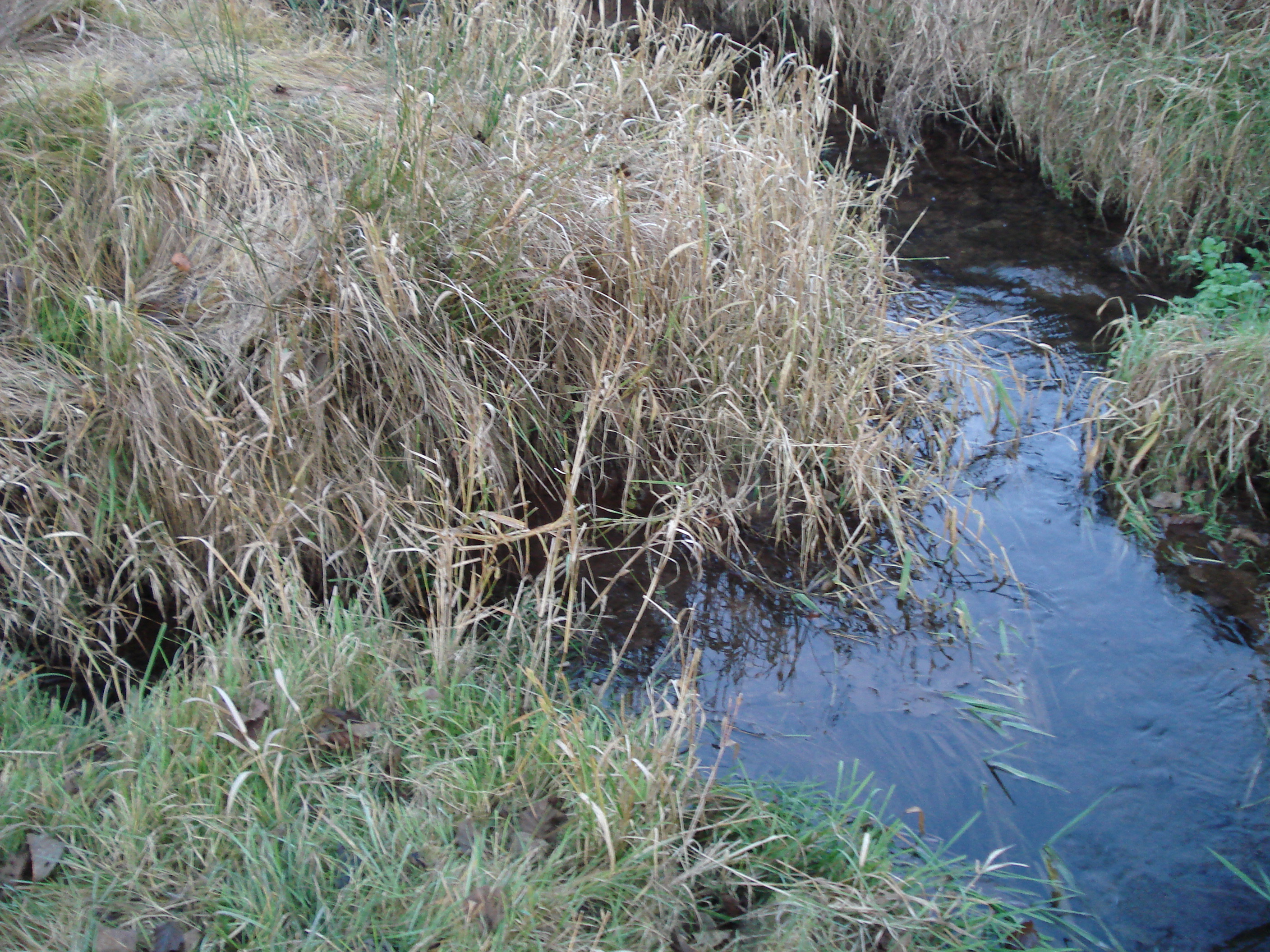 Der Birklersbach (links) mündet in den Aubach